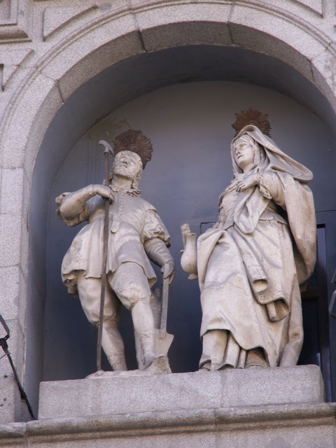 mágenes de San Isidro y Sta. María de la Cabeza en la fachada principal de la Catedral de San Isidro, en Madrid (España). Calle Toledo.